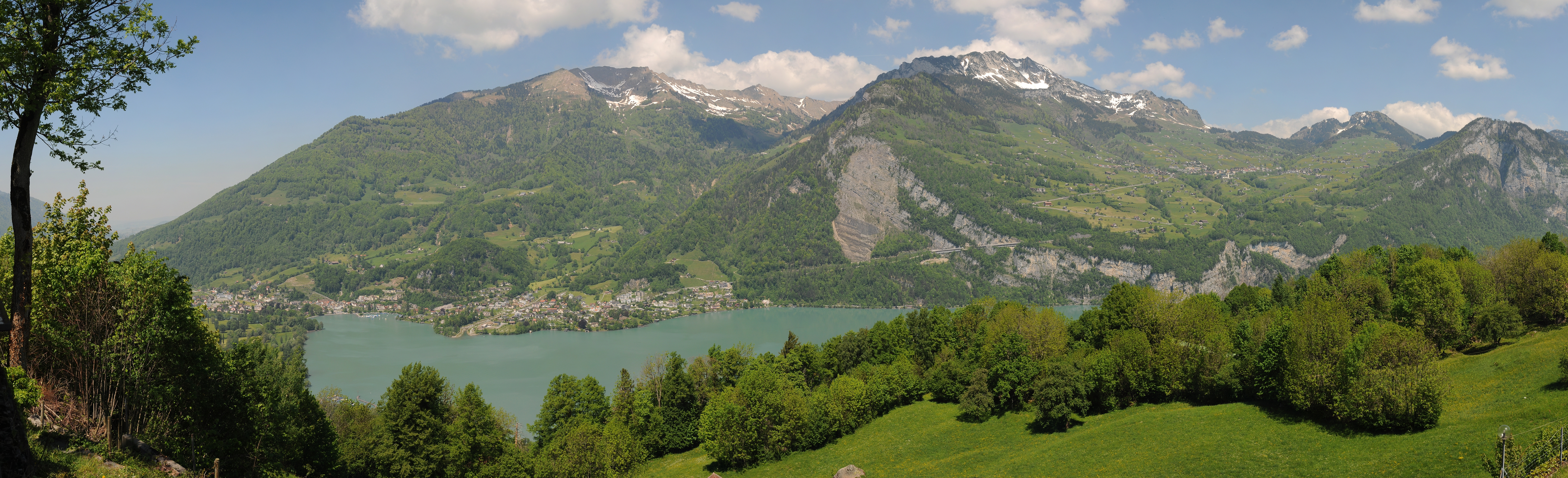 Amden ist eine politische Gemeinde im Kanton St. Gallen. Sie wird als „Sonnenterrasse“ des Walensees bezeichnet. Blick von Filzbach, auf dem Kerenzerberges. NOTE: This image is a panorama consisting of multiple frames that were merged or stitched in software. As a result, this image necessarily underwent some form of digital manipulation. These manipulations may include blending, blurring, cloning, and color and perspective adjustments. As a result of these adjustments, the image content may be slightly different than reality at the points where multiple images were combined. This manipulation is often required due to lens, perspective, and parallax distortions.